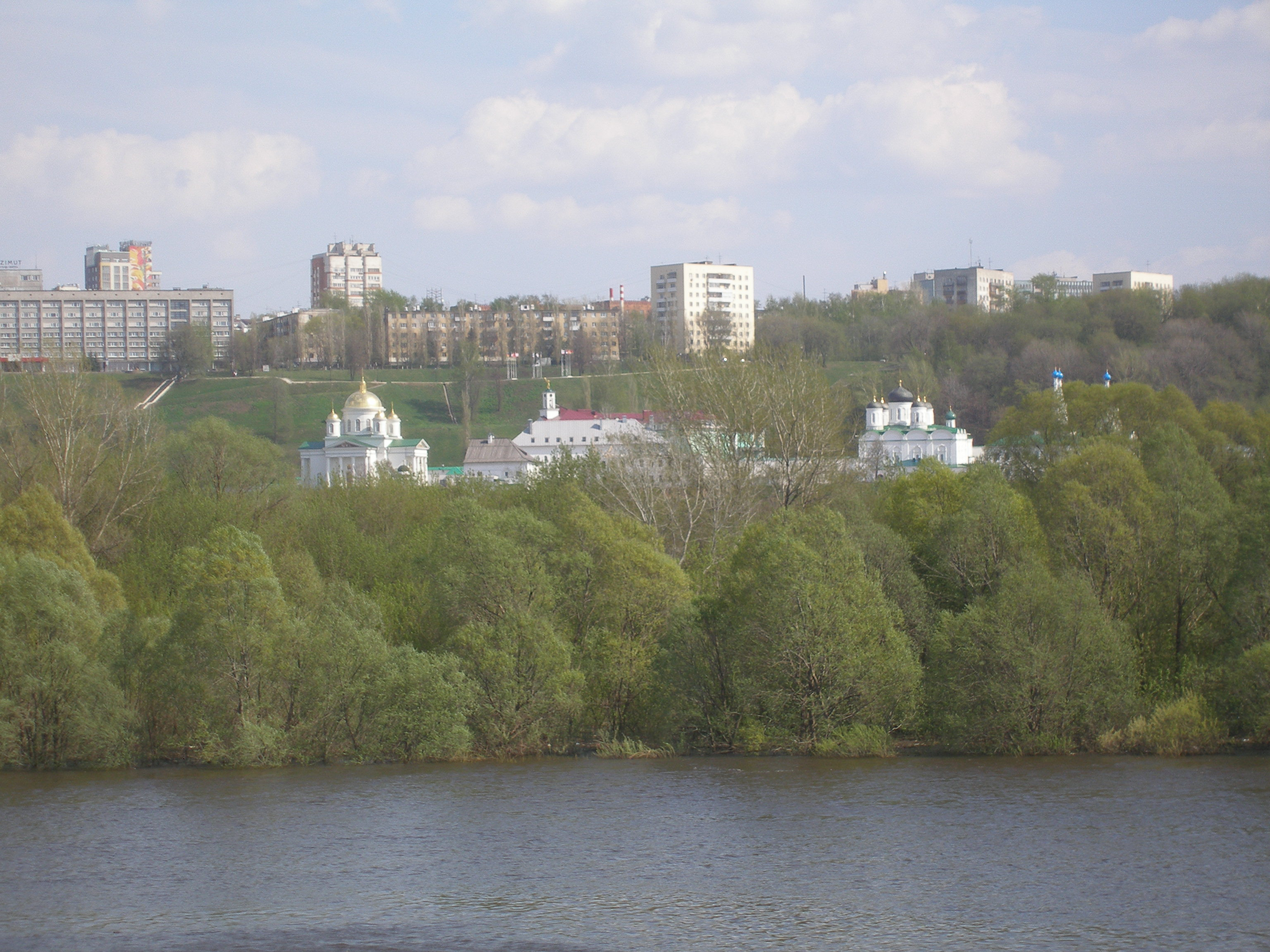 Вид на Благовещенский монастырь с набережной (ул. Советская)